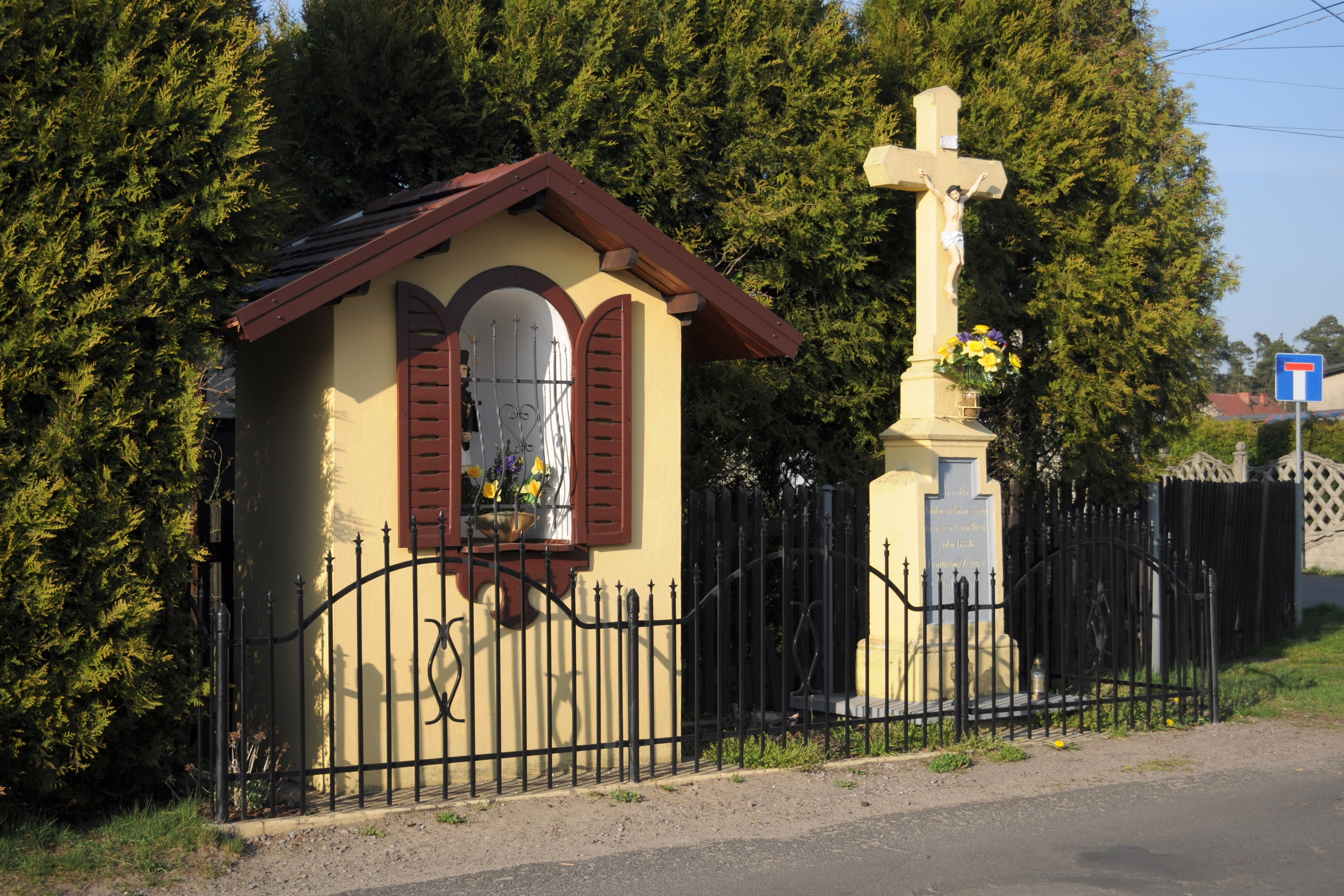 Boruszowice. Kapliczka i krzyż.